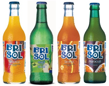 BriSol